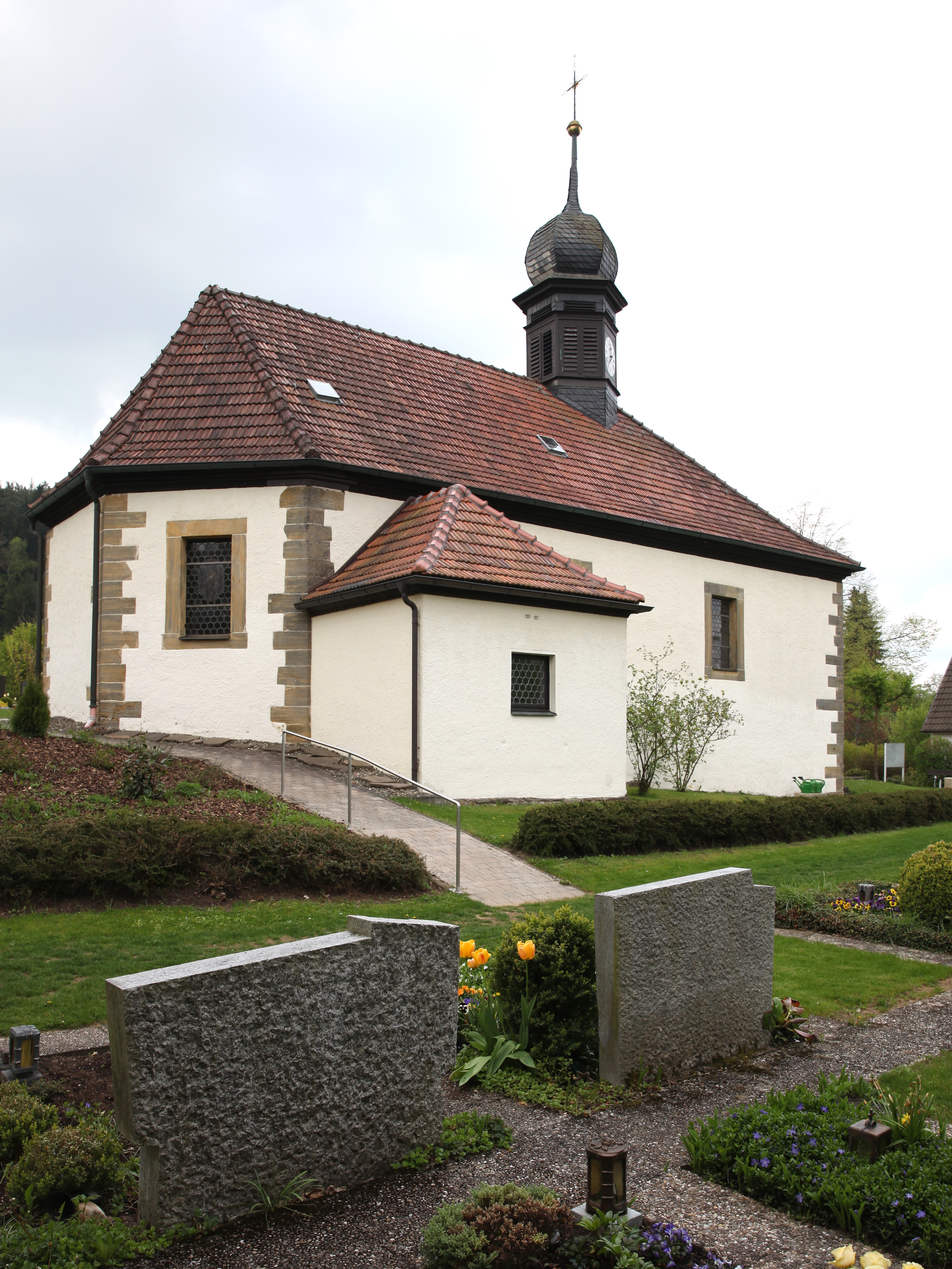 Mater Dolorosa in Altenhof